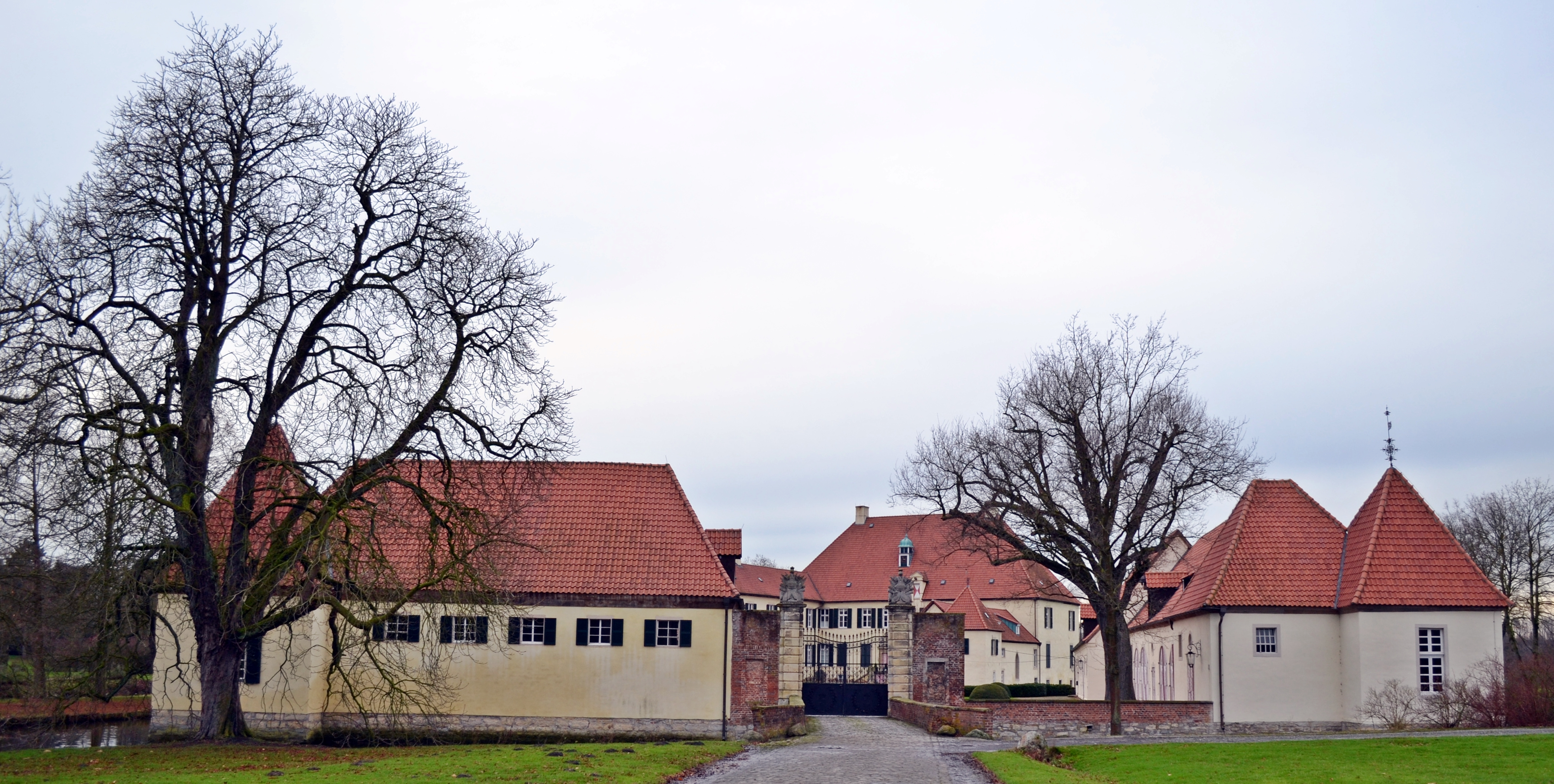 Ostenfelde Schloss Vornholz Einfahrt